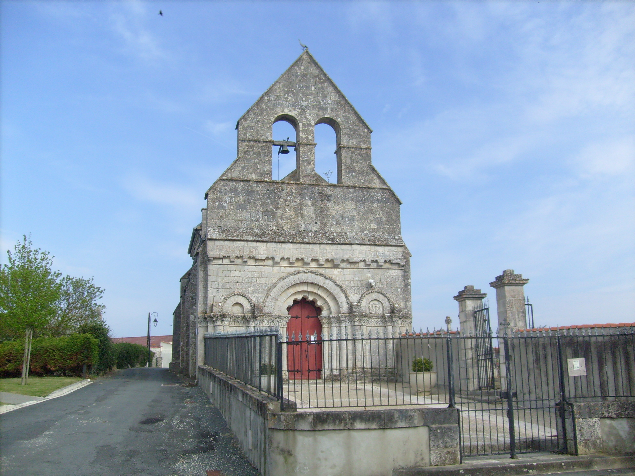 L'église Saint-Clément, Cabariot